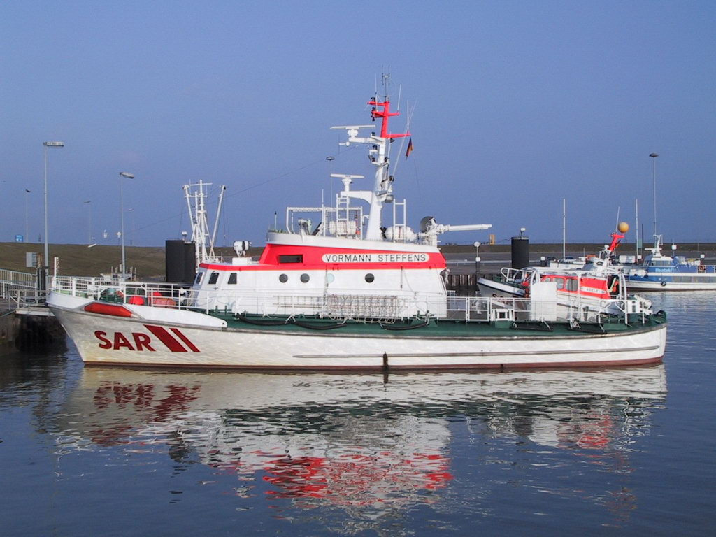 SK Vormann Steffens am Anleger in Hooksiel